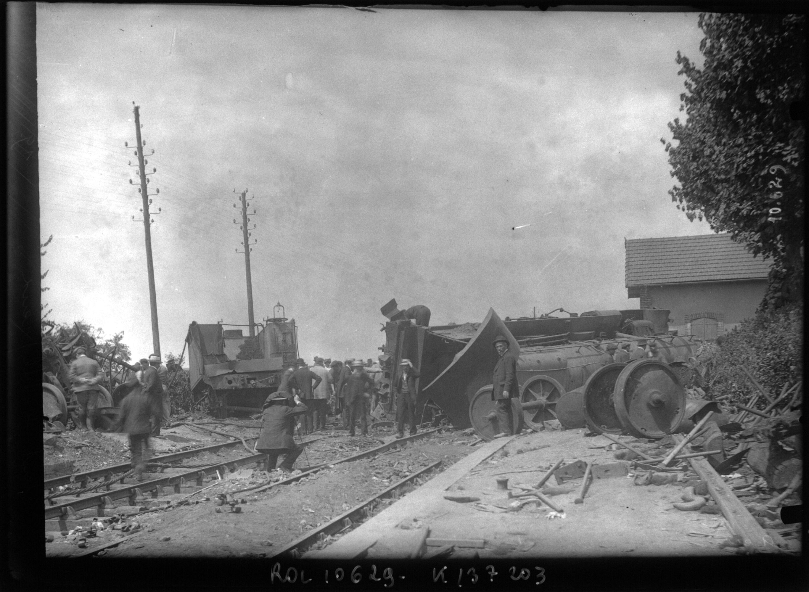 Accident de Villepreux-[les-Clayes, Yvelines], 19/6/1910 [accident ferroviaire entre l'express de Granville et un train omnibus en gare de Villepreux] : [photographie de presse] / [Agence Rol]